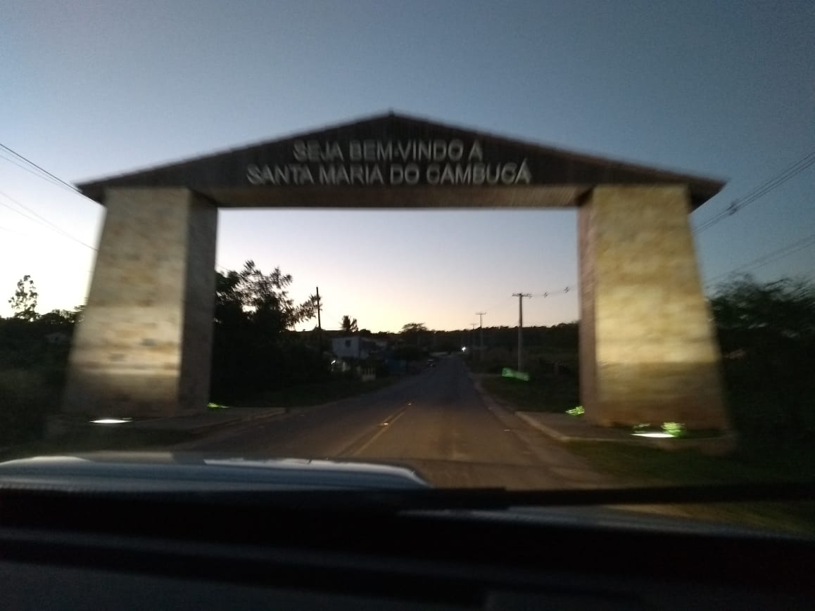 Bem vindo à Santa Maria do Cambucá/PE